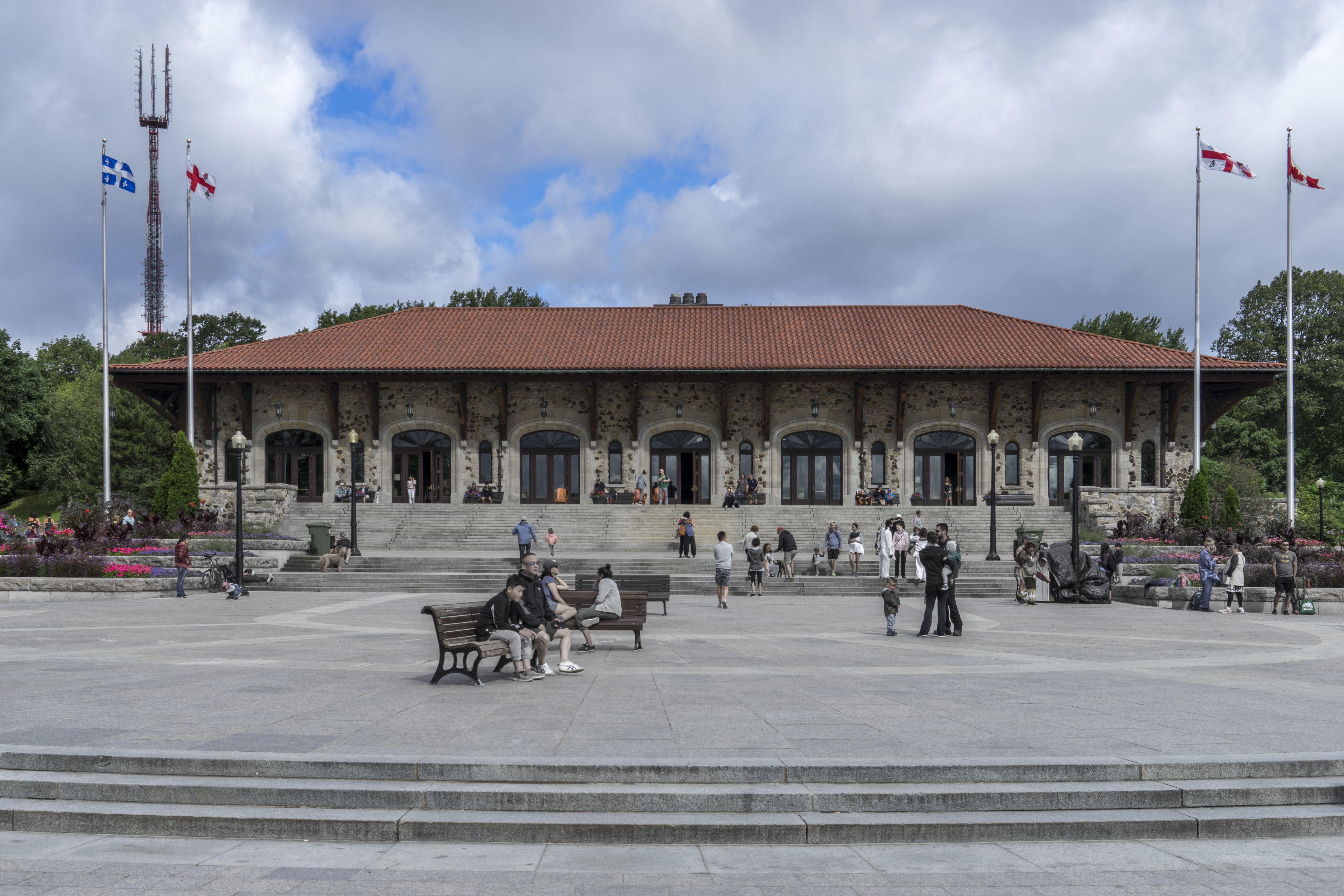 Mount Royal Chalet, Montreal 1